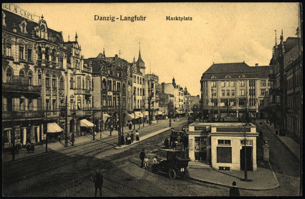 Gdańsk Wrzeszcz, dawny rynek około 1900 roku.